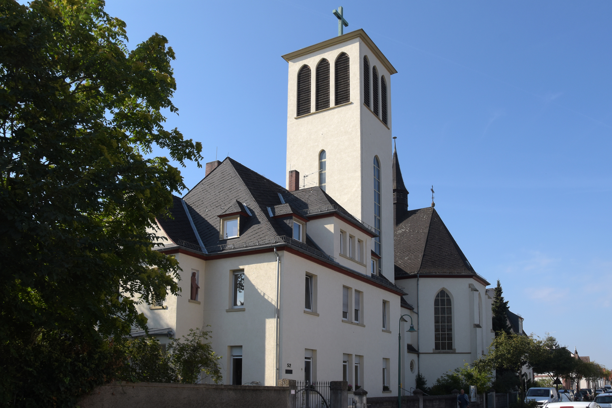 Denkmalgeschützte katholische Kirche in Darmstadt Eberstadt, Schwanenstraße